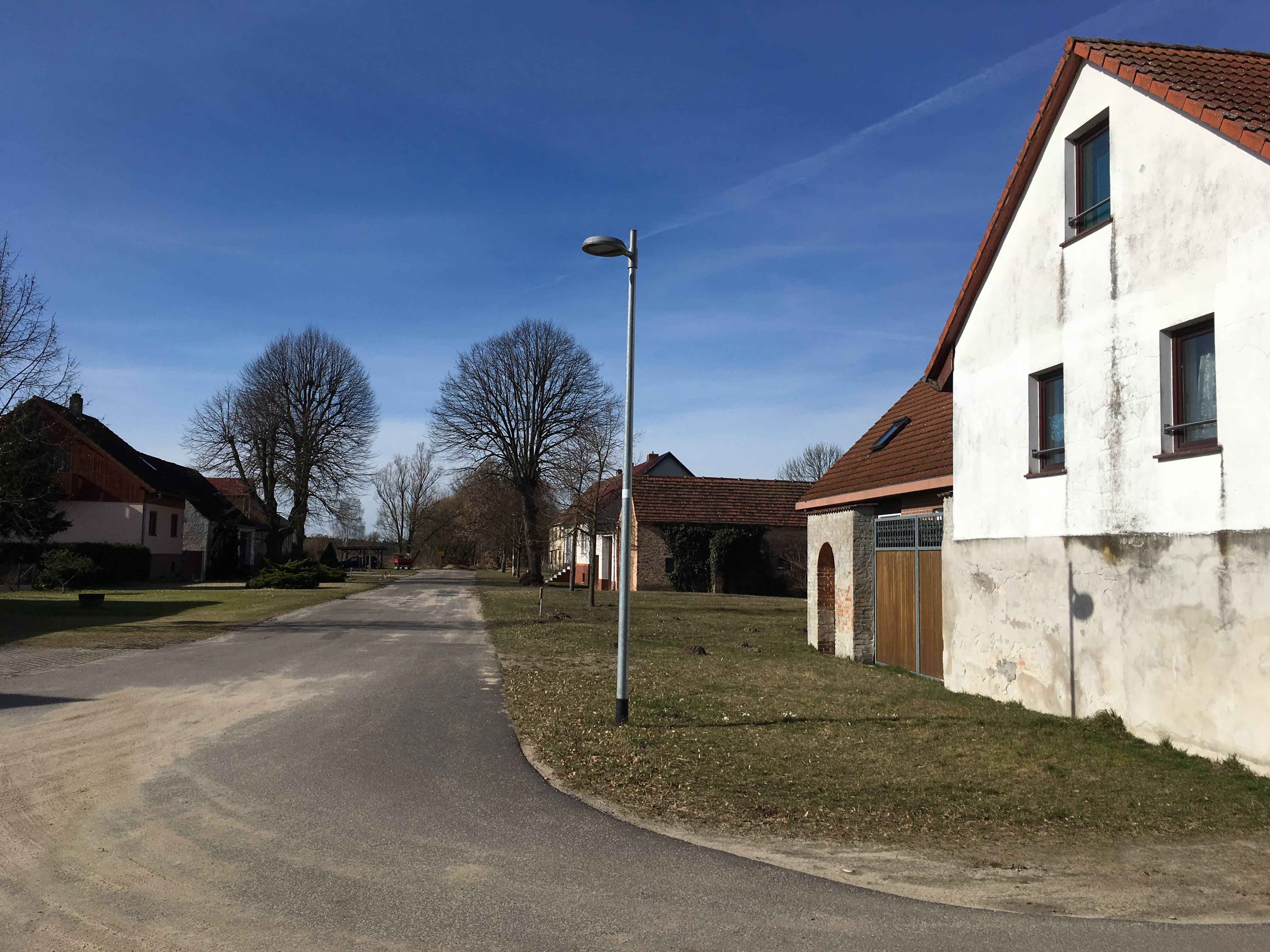 Birkhorst, ein Gemeindeteil des Ortsteils Salzbrunn der Stadt Beelitz im Landkreis Potsdam-Mittelmark in Brandenburg